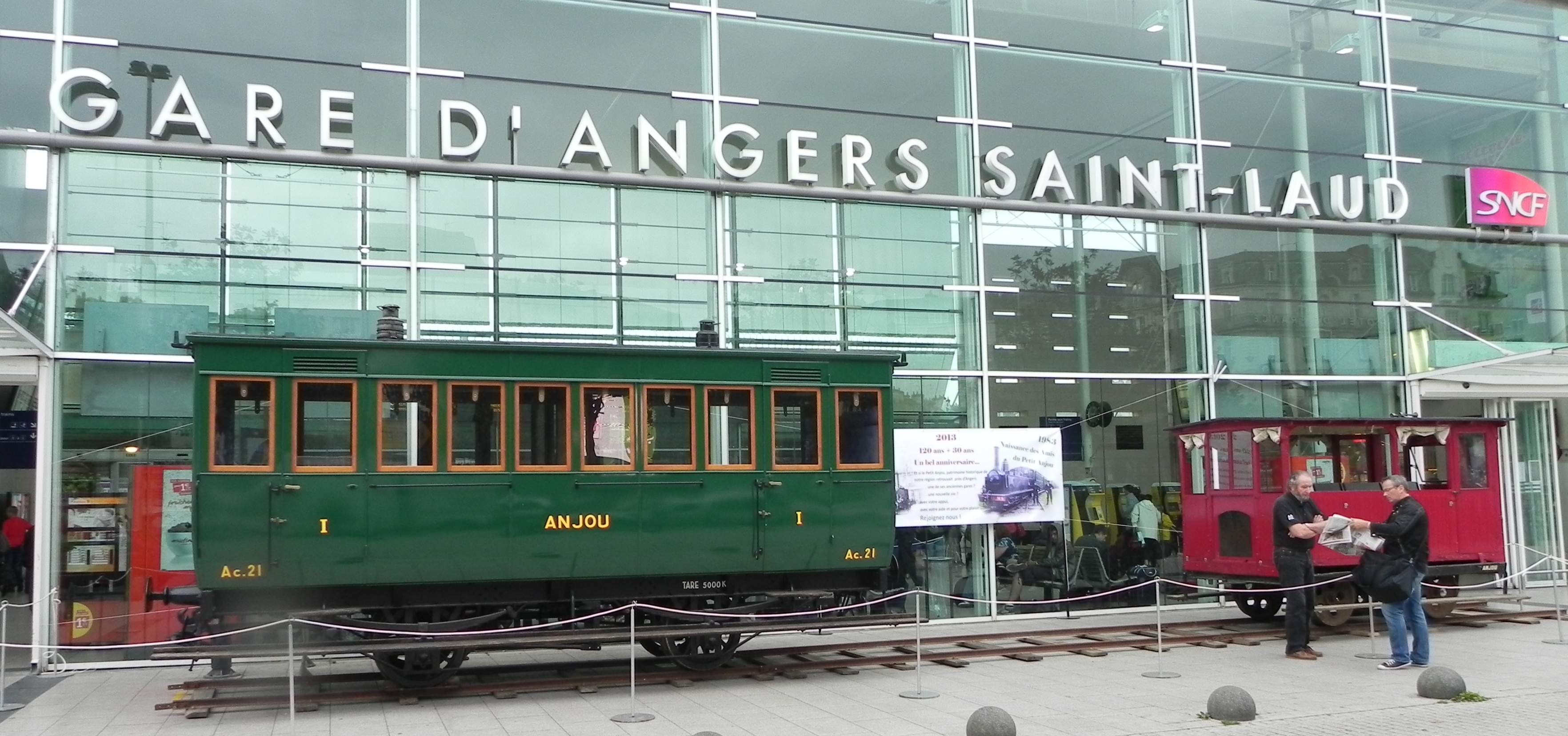 Voiture Ac21 et draisine SE4 de l'association des amis du Petit Anjou devant la gare d'Angers lors des journées du patrimoine de 2011